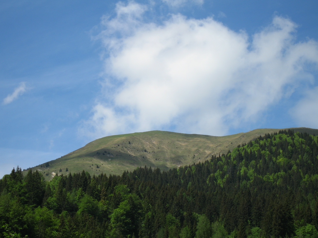 Golica, Slovenia